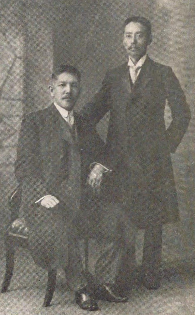 望月圭介と尾崎行雄